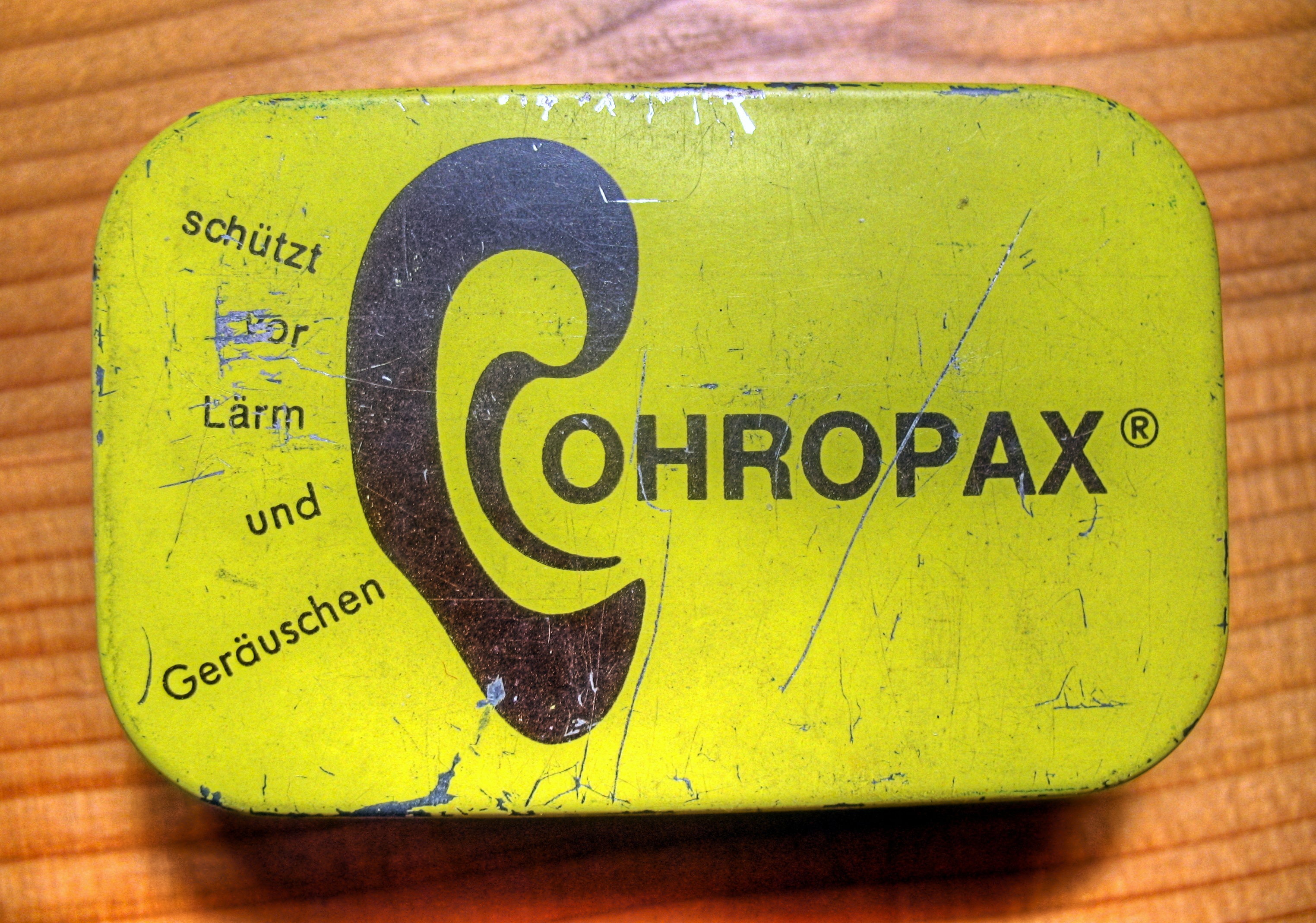 Original Ohropax-Schachtel aus den 1950er Jahren; Hersteller: Apotheker Negwer, Bad Homburg v. d. H.